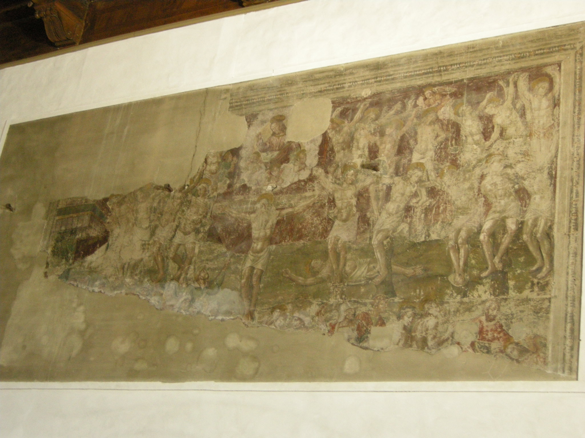 Accademia di firenze, crocefissione